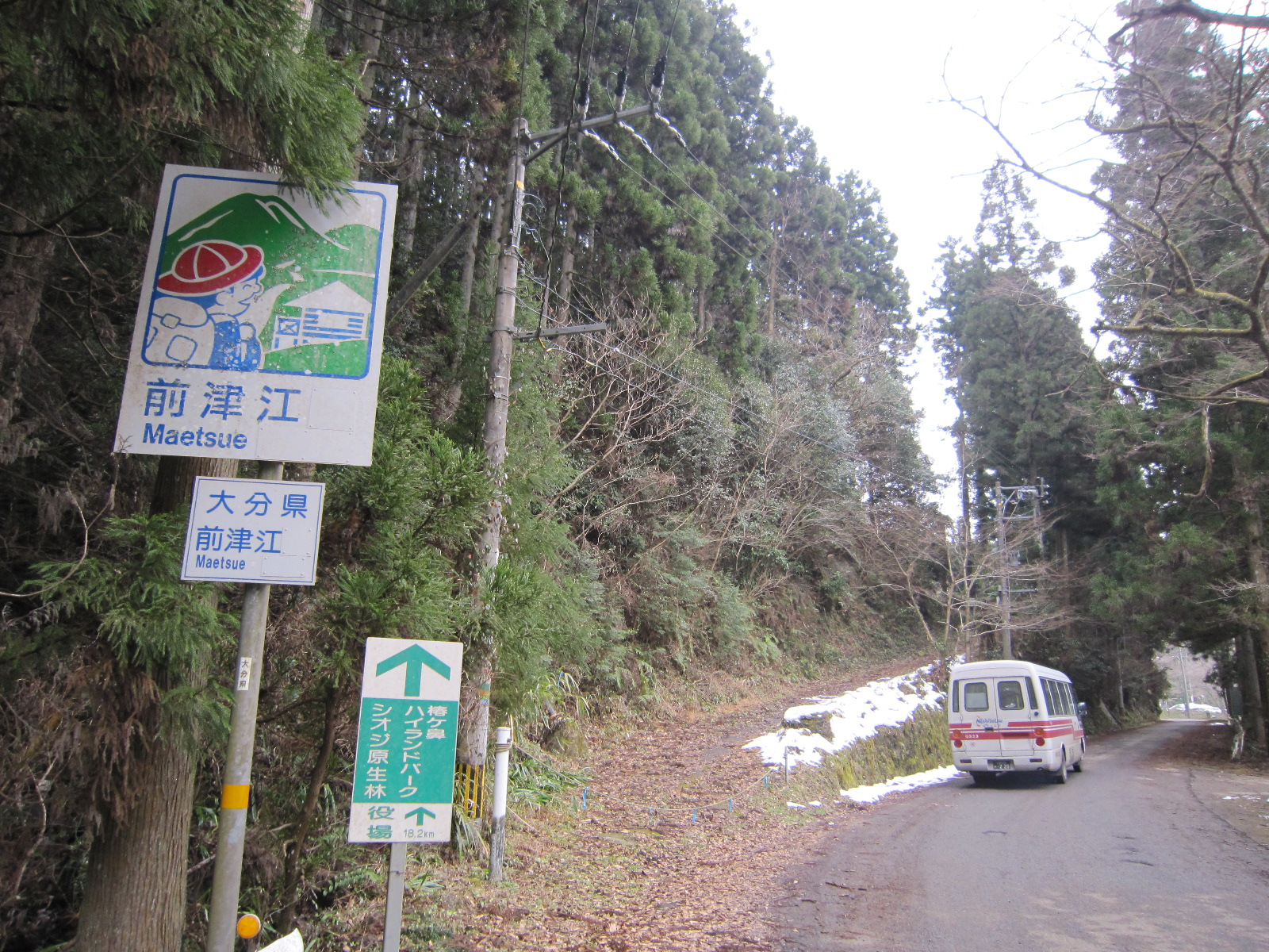 大分県と福岡県の県境を超える西鉄バス